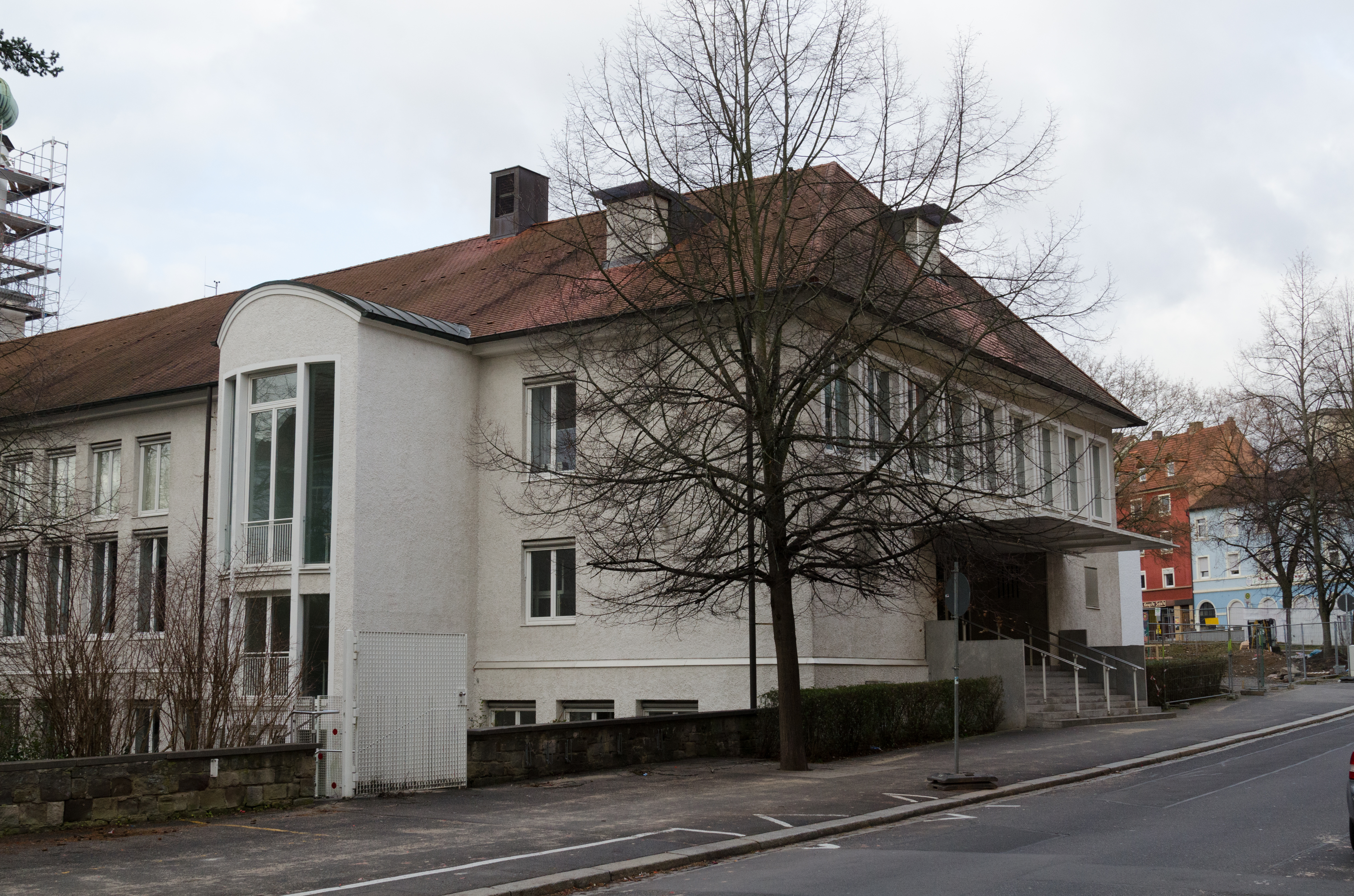 Schweinfurt, Friedenstraße 23